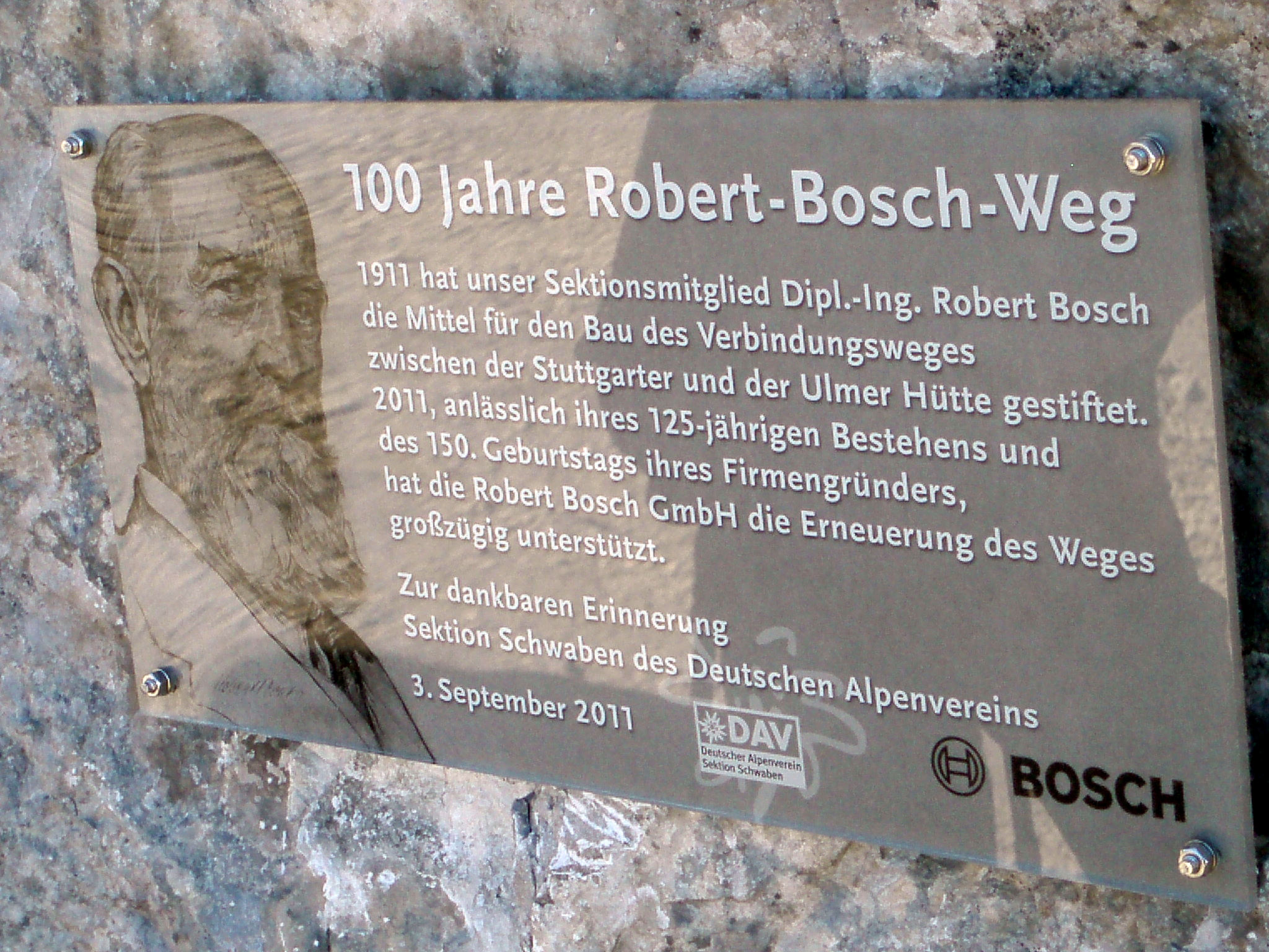 Einer der 2011 errichteten Gedenktafeln am Robert-Bosch-Weg